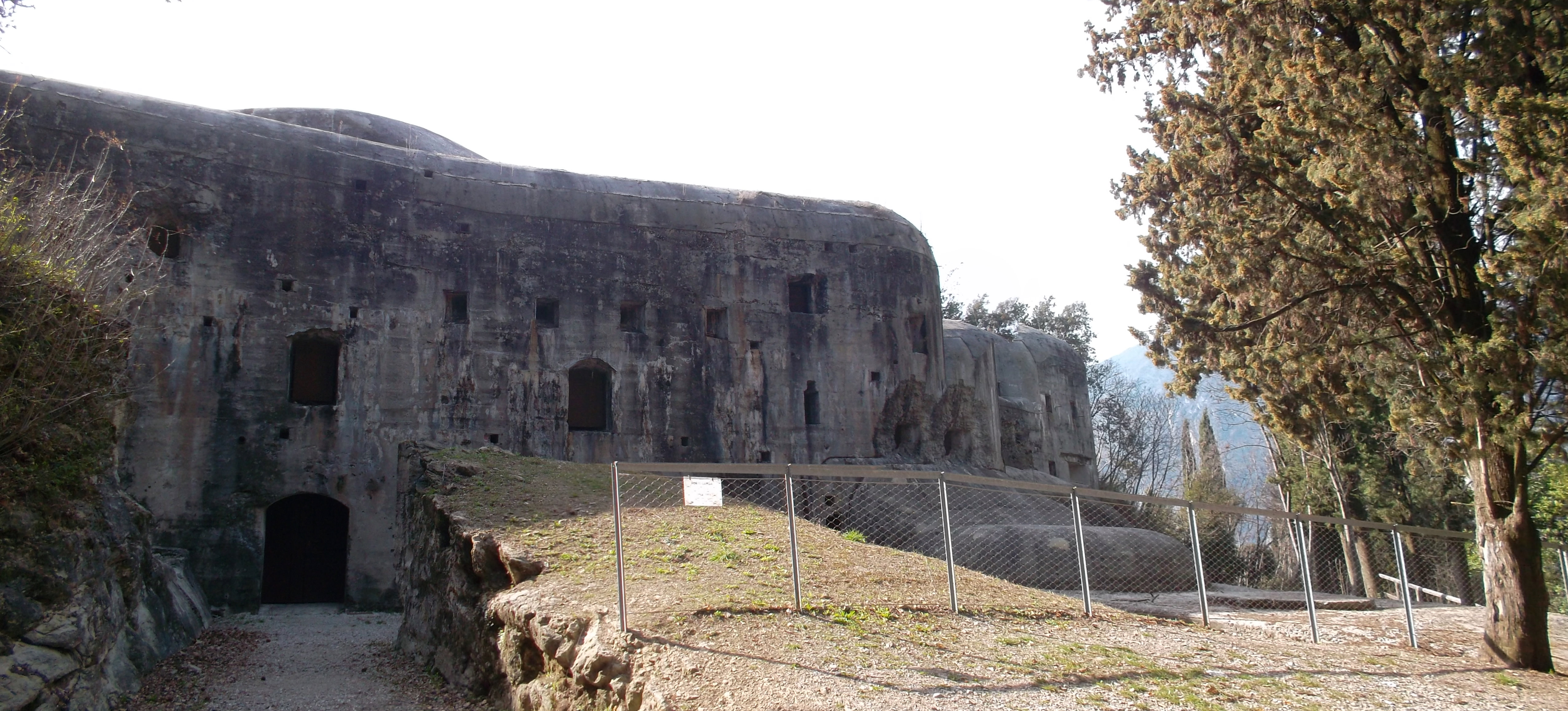 Forte Garda dopo il restauro, entrata principale